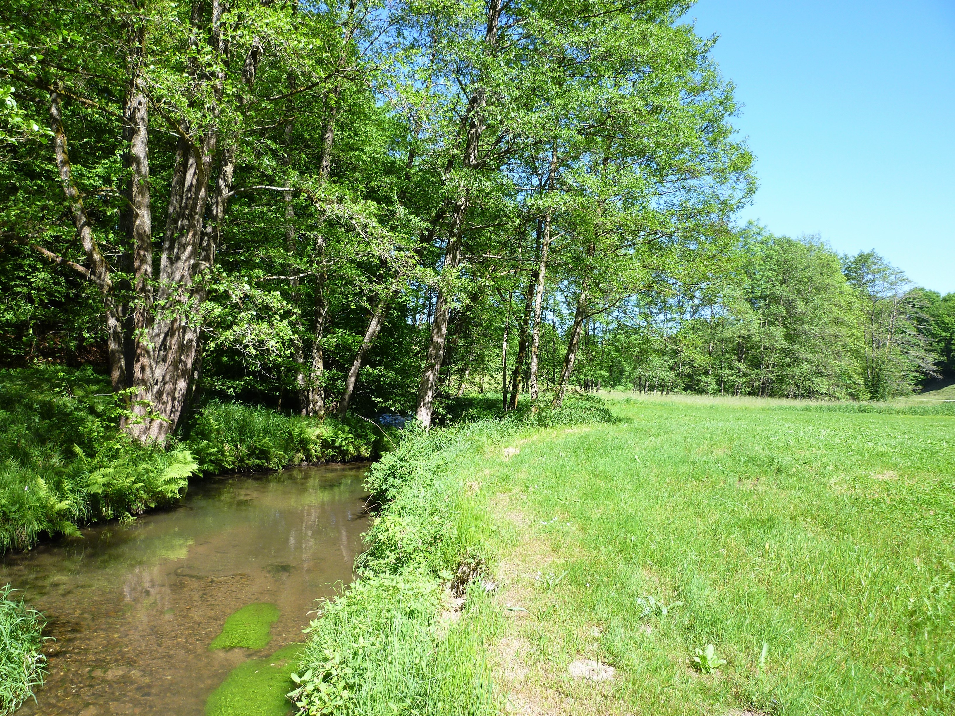 Der Bachlauf der Kleinen Ohe bei Schöllnach gehört zum FFH-Gebiet "Bayerwaldbäche um Schöllnach und Eging am See. Das Foto zeigt die Kleine Ohe bei Schöllnach.